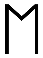 runic letter ehwaz